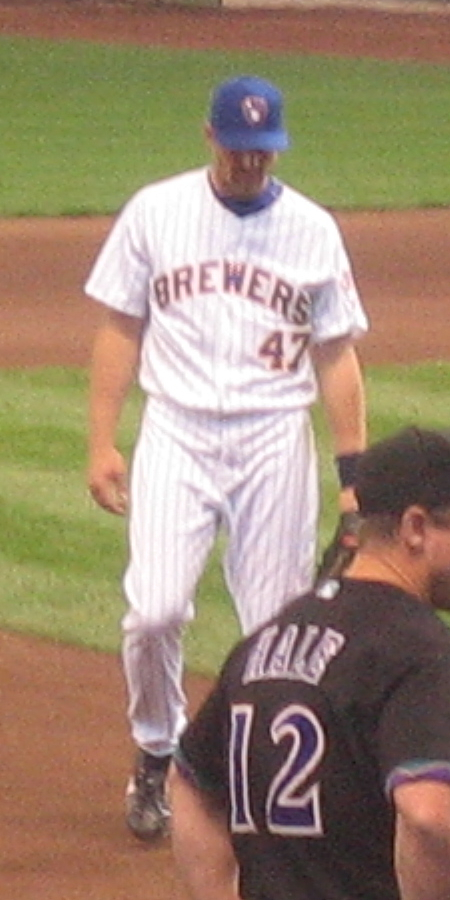 Corey Koskie